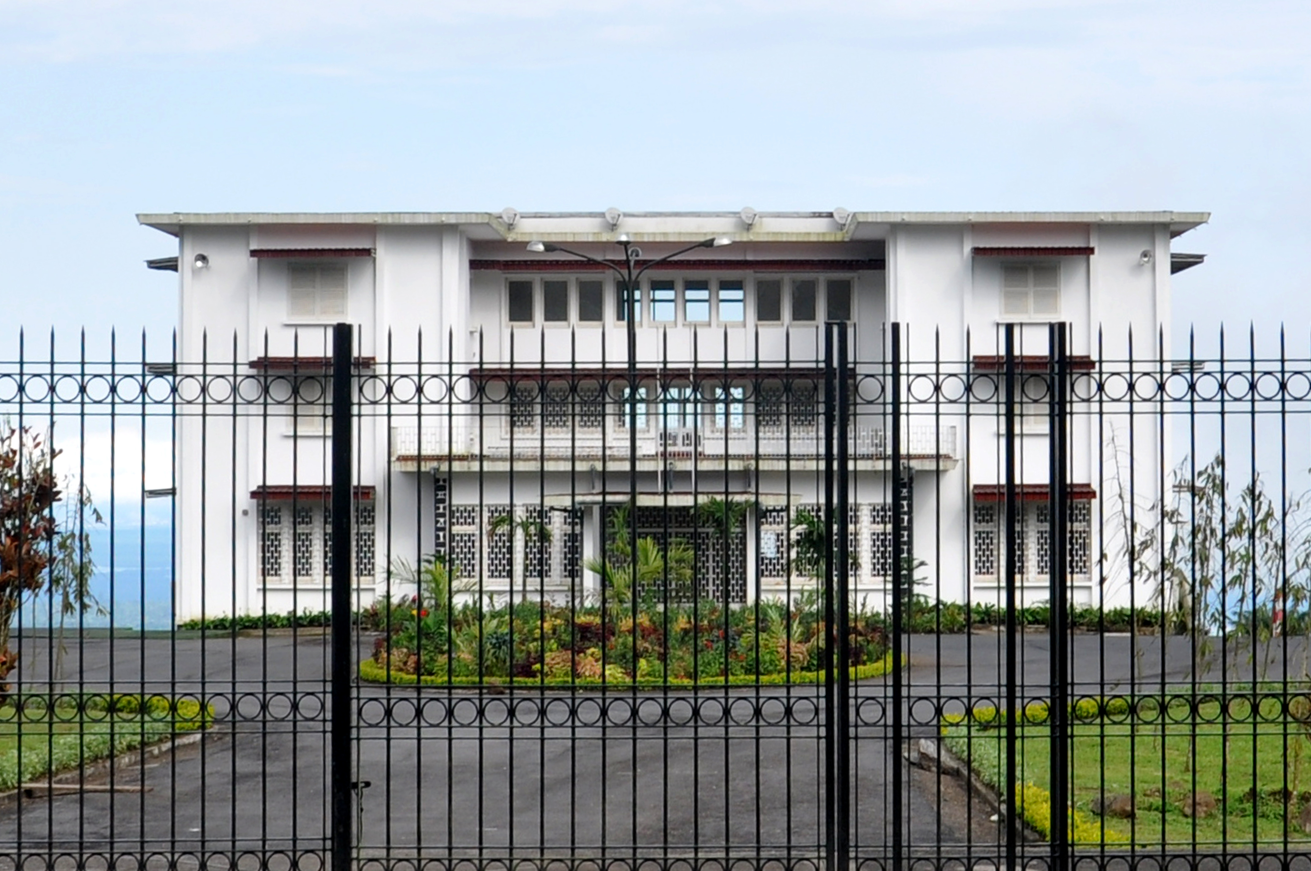 Palais du gouverneur Von Puttkamer